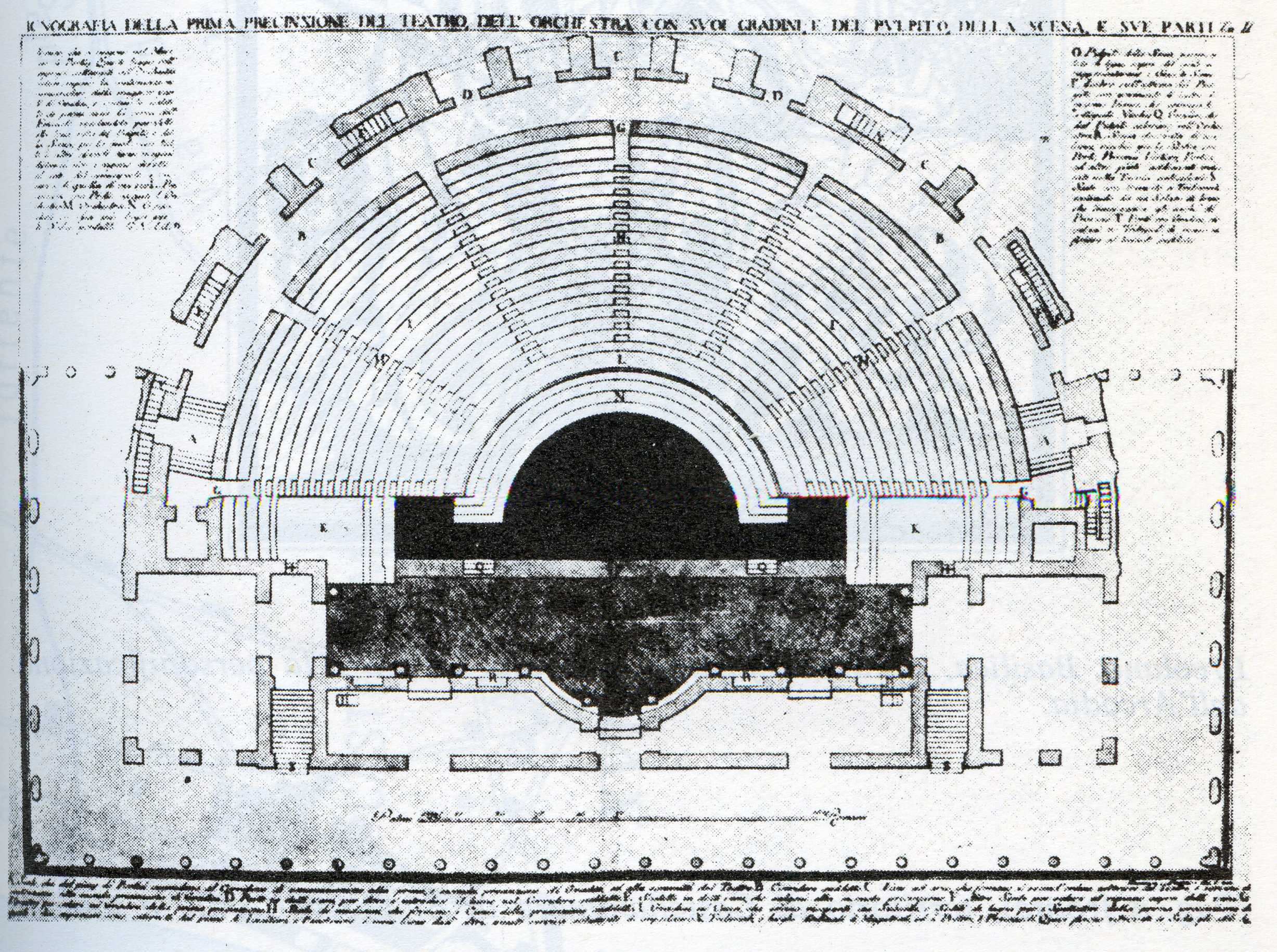 Plan du théâtre d'Herculanum par Piranese